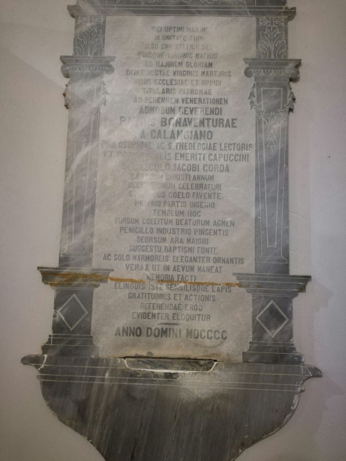 Lapide in lingua latina a Calangianus